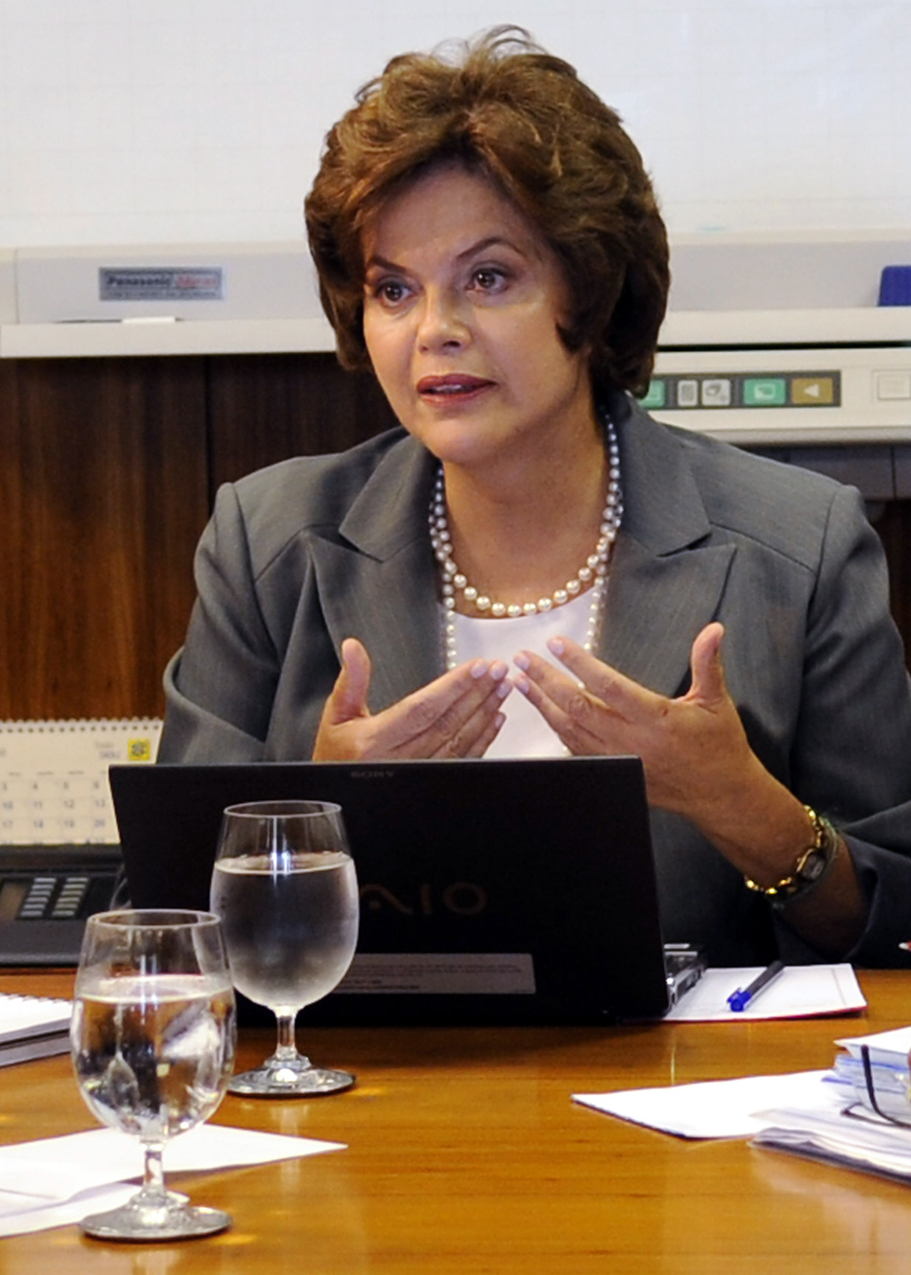 Brasília - A ministra da Casa Civil, Dilma Rousseff, durante apresentação do plano de habitação às centrais sindicais